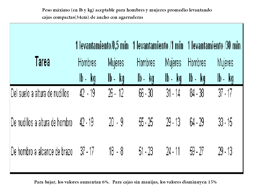 Paso maximo aceptable para levantamiento de cajas